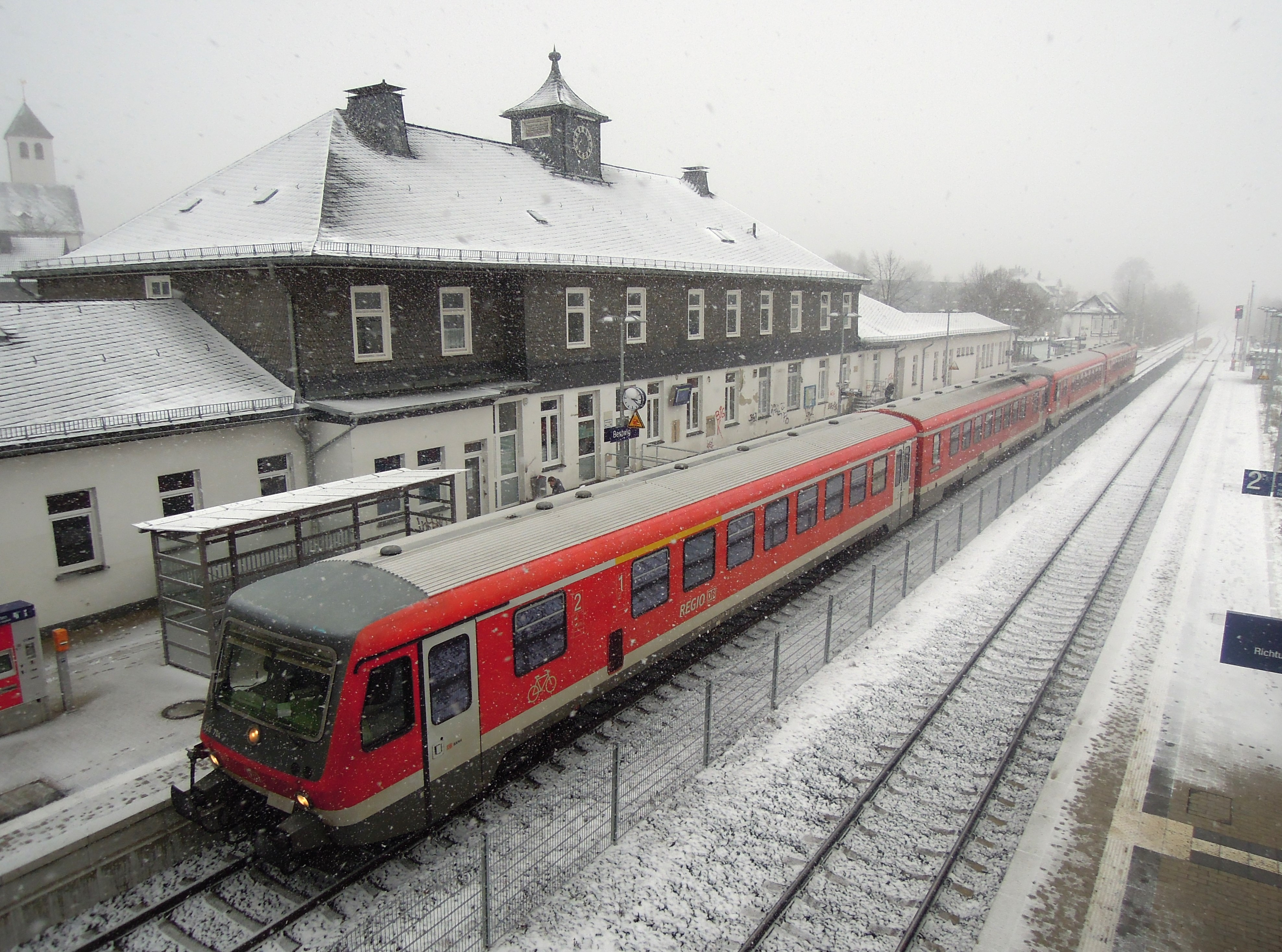 628 704 im Bahnhof Bestwig; Fahrtziel ist Warburg (Westf.)